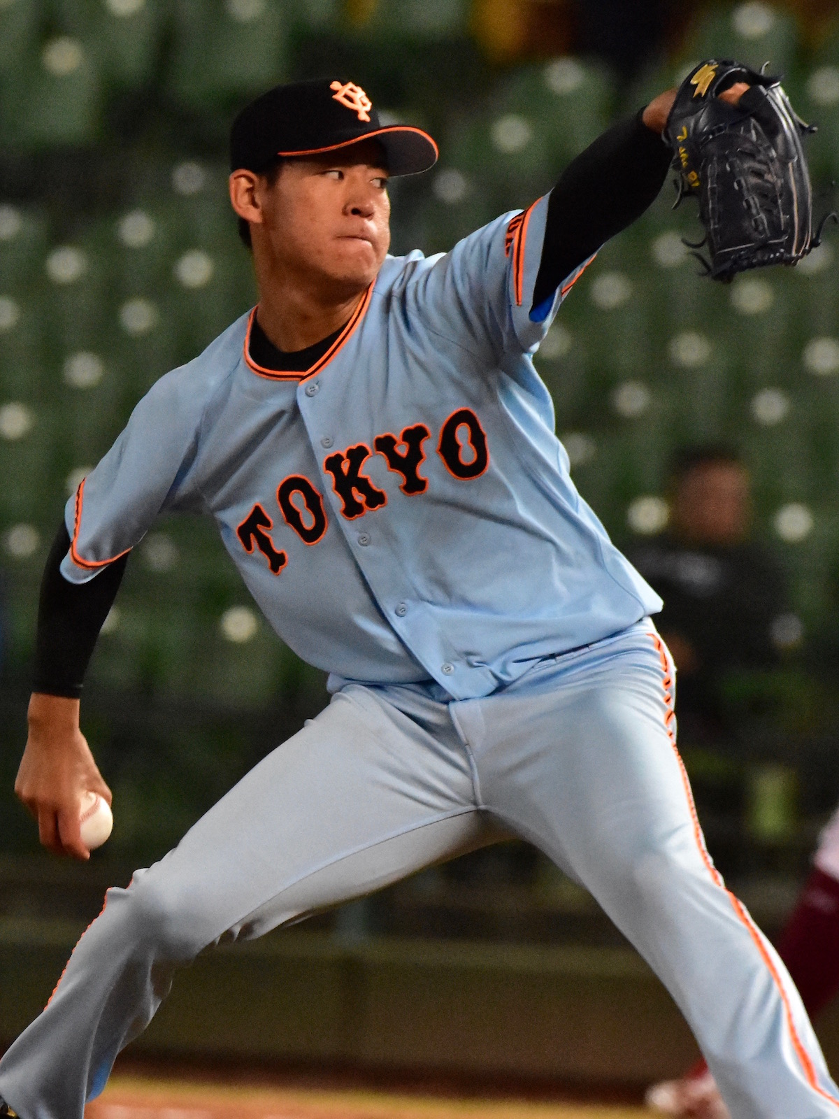 2016年12月18日、台中インターコンチネンタル野球場にて